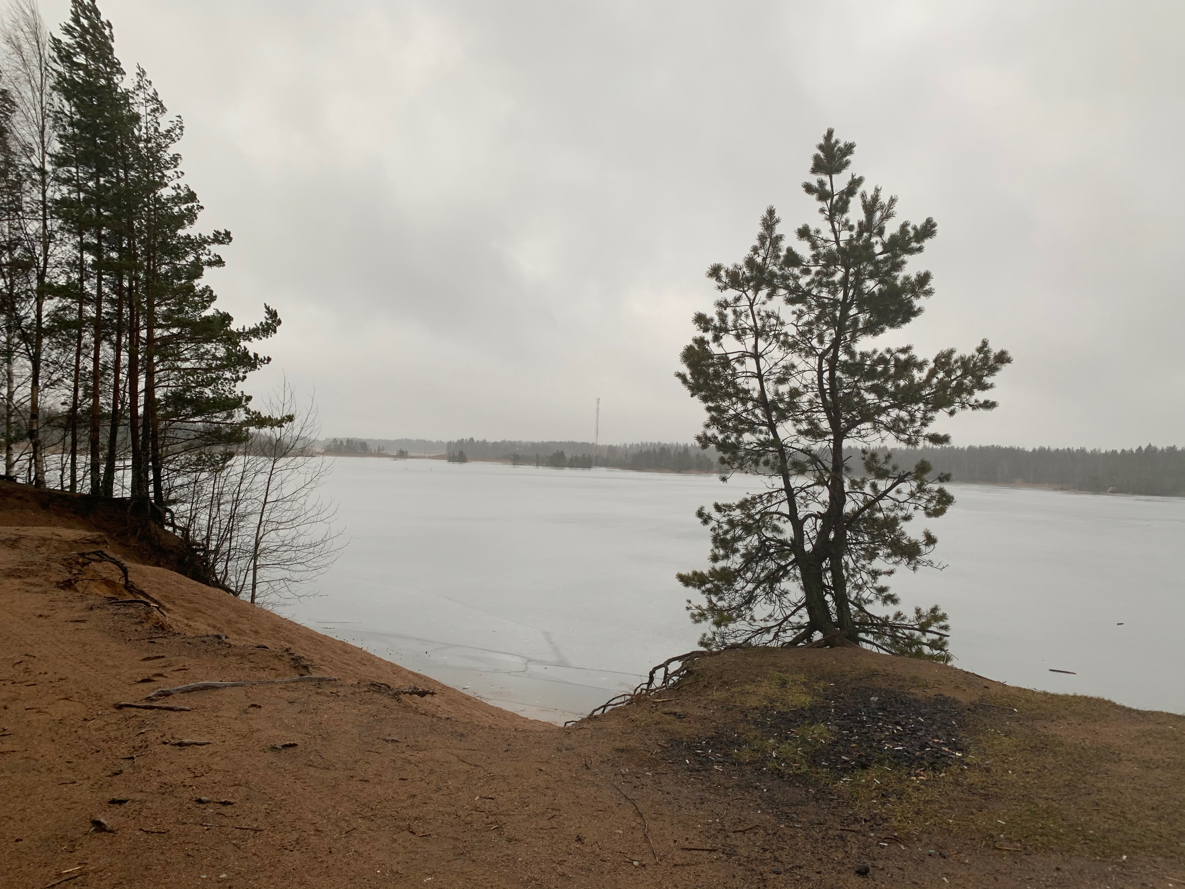 Озеро у трассы Е18